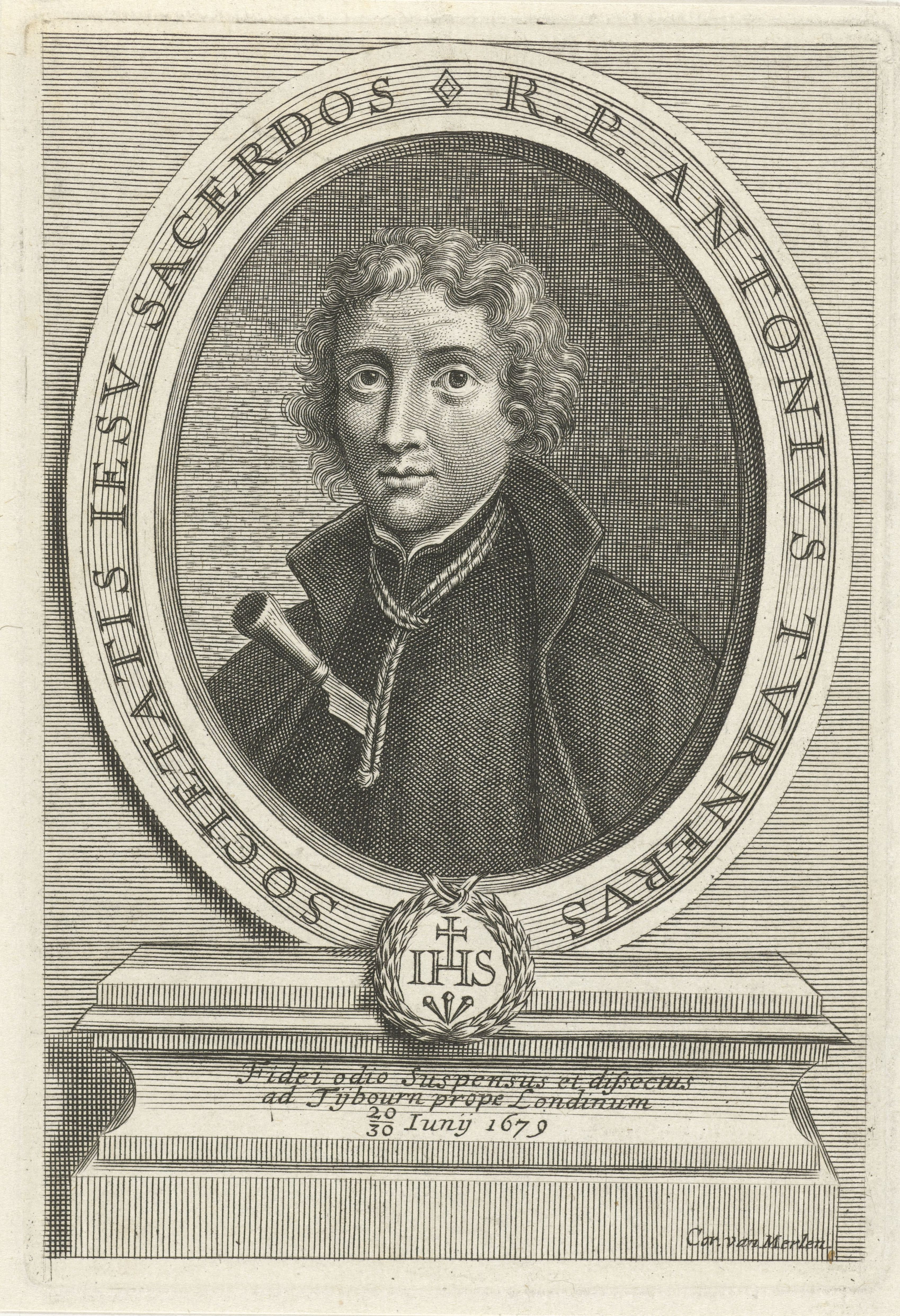 IdentificatieTitel(s): Portret van Anthony TurnerObjecttype: prent Objectnummer: RP-P-1921-1825Catalogusreferentie: Hollstein Dutch 2Opschriften / Merken: verzamelaarsmerk, verso, gestempeld: Lugt 2233Omschrijving: Portret van de Jezuïet Anthony Turner, die in 1679 om zijn Rooms-katholieke geloof werd vermoord.VervaardigingVervaardiger: prentmaker: Cornelis van Merlen (vermeld op object)Plaats vervaardiging: AntwerpenDatering: 1680 - 1723Fysieke kenmerken: gravureMateriaal: papier Techniek: graveren (drukprocedé)Afmetingen: plaatrand: h 146 mm × b 100 mmOnderwerpWie: Anthony TurnerVerwerving en rechtenVerwerving: aankoop 1905Copyright: Publiek domein